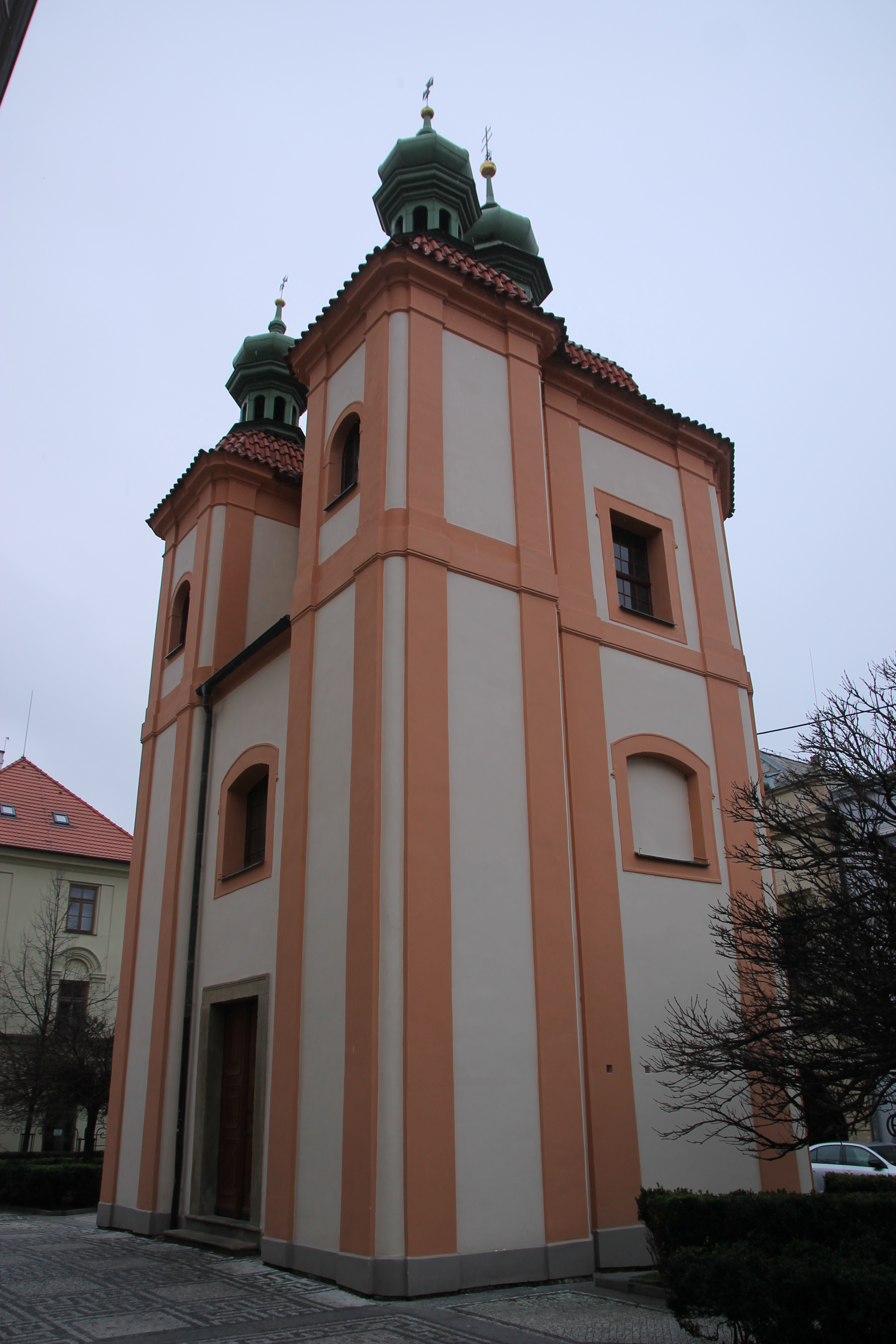 Kaple smrtelných úzkostí Páně, České Budějovice